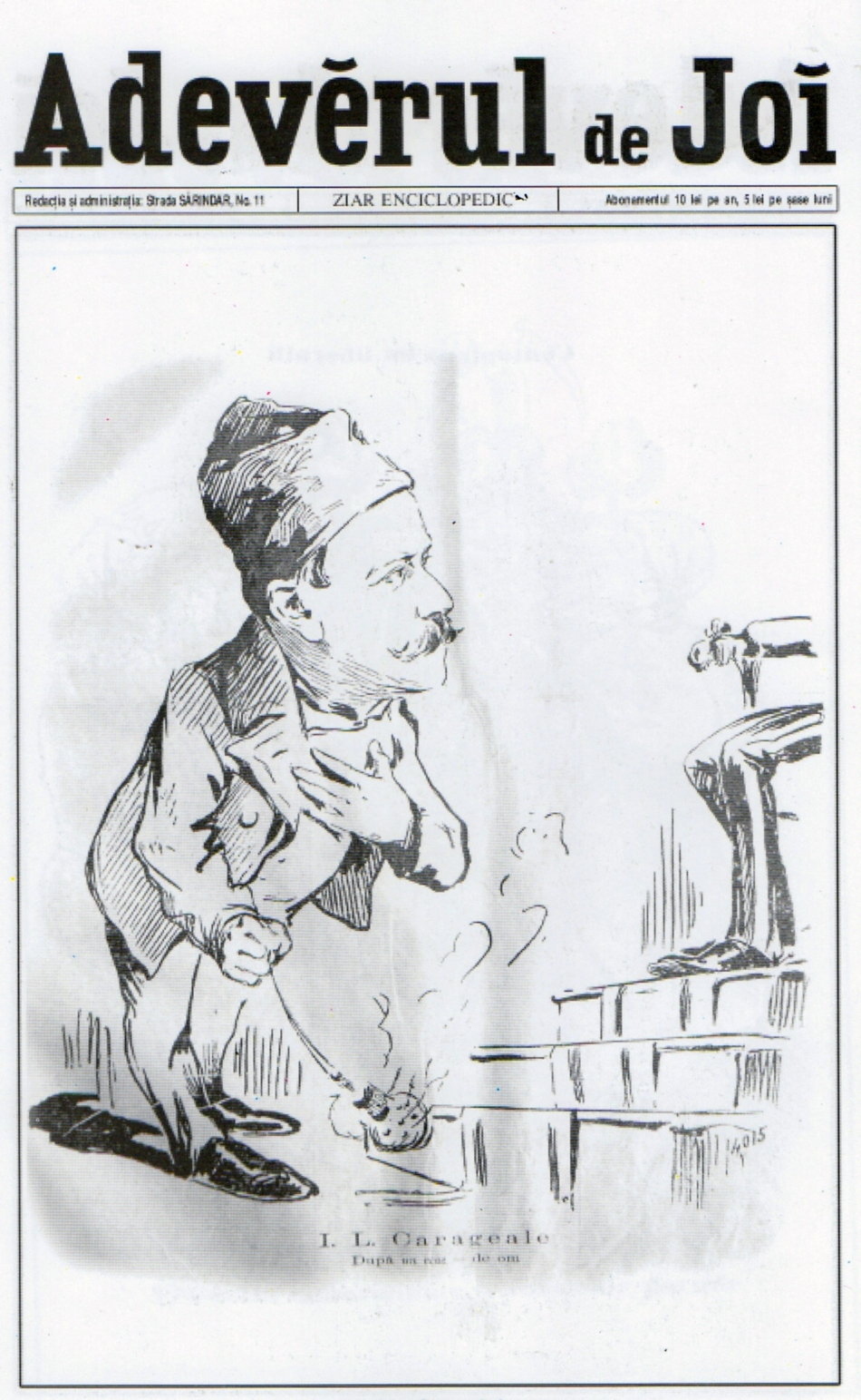 I.L. Caragiale - După o viață de om... în Ziarul Adevărul de Joi